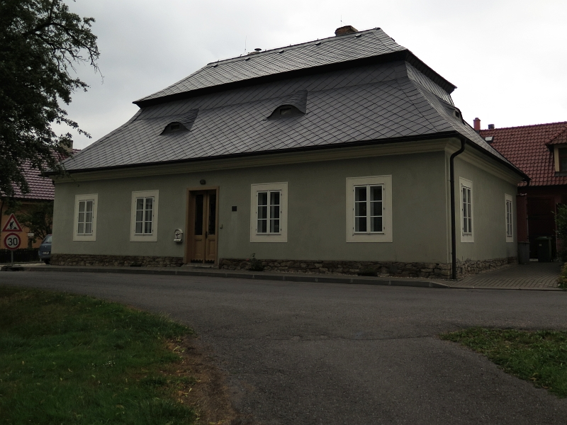 Fara, Žichlínek 1, Žichlínek.